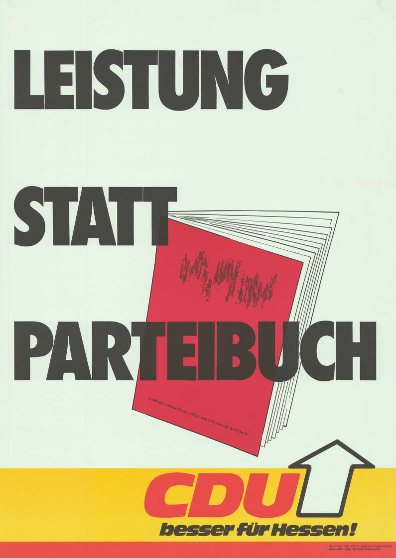 Leistung statt Parteibuch CDU besser für Hessen! Abbildung: Rotes Parteibuch (Grafik) Plakatart: Motiv-/Textplakat Auftraggeber: Verantw.: CDU-Landesverband Hessen, Wiesbaden Objekt-Signatur: 10-007 : 575 Bestand: Landtagswahlplakate Hessen (10-007) GliederungBestand10-18: Landtagswahlplakate Hessen (10-007) » CDU Lizenz: KAS/ACDP 10-007 : 575 CC-BY-SA 3.0 DE